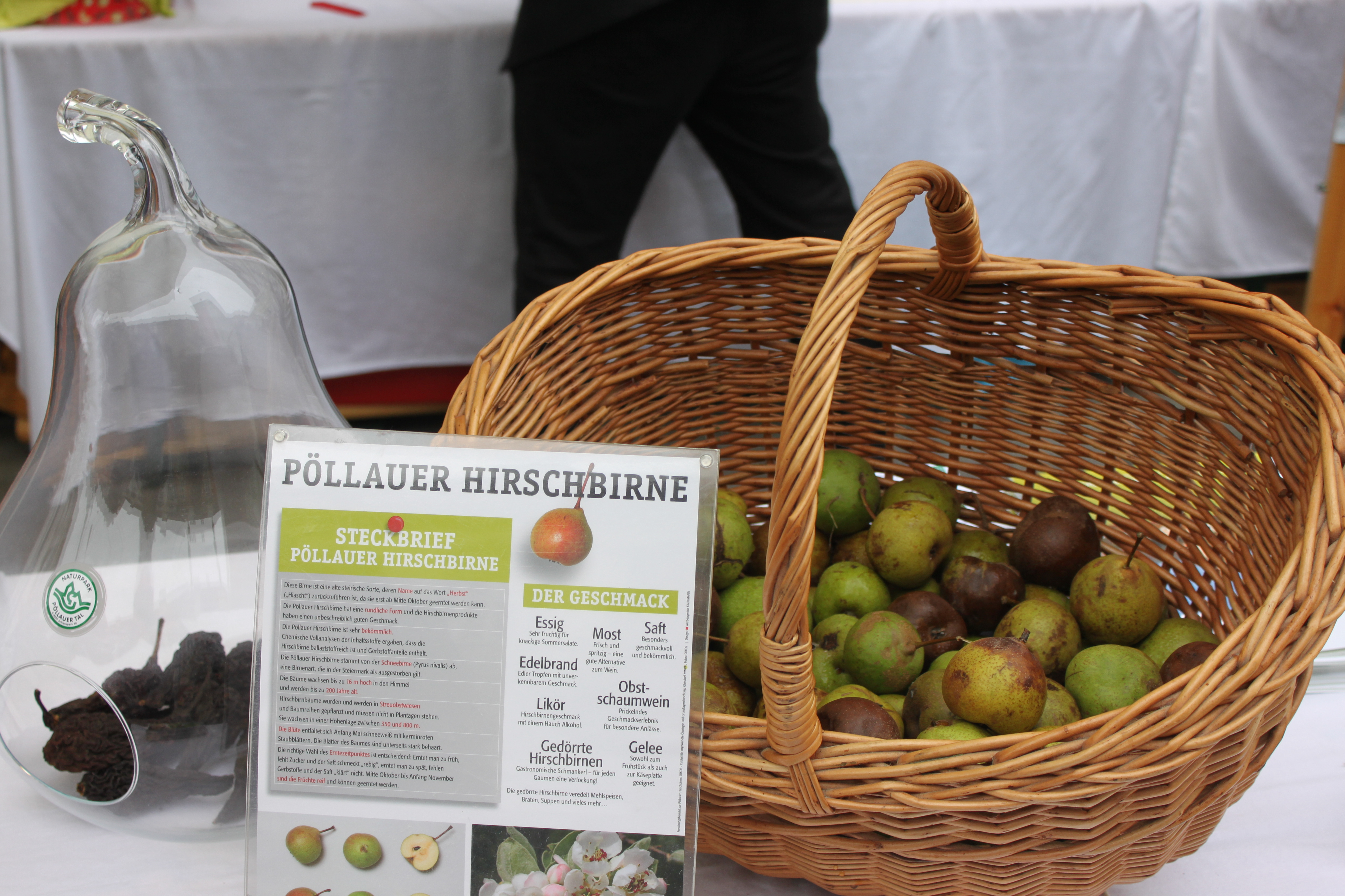 Hirschbirne, Detail einer öffentlichen Ausstellung in der Herrengasse in Graz, links getrocknete Hirschbirnen in einem Glasbehälter, rechts Hirschbirnen in verschiedenen Zuständen der Reife in einem Korb